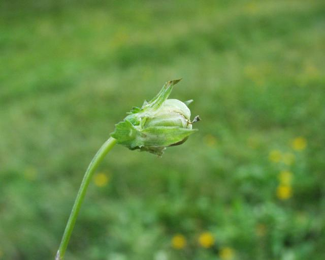 (en) Mountain Pansy (Viola lutea subsp.lutea), a photography originating of the internet site The accord of the autor, H. Brisse, is here. (fr) Pensée jaune (Viola lutea subsp.lutea), une photographie issue du site internet L'accord de l'auteur, H. Brisse, se situe ici.